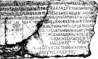 Битолски надпис на Иван Владислав от 1016 г.